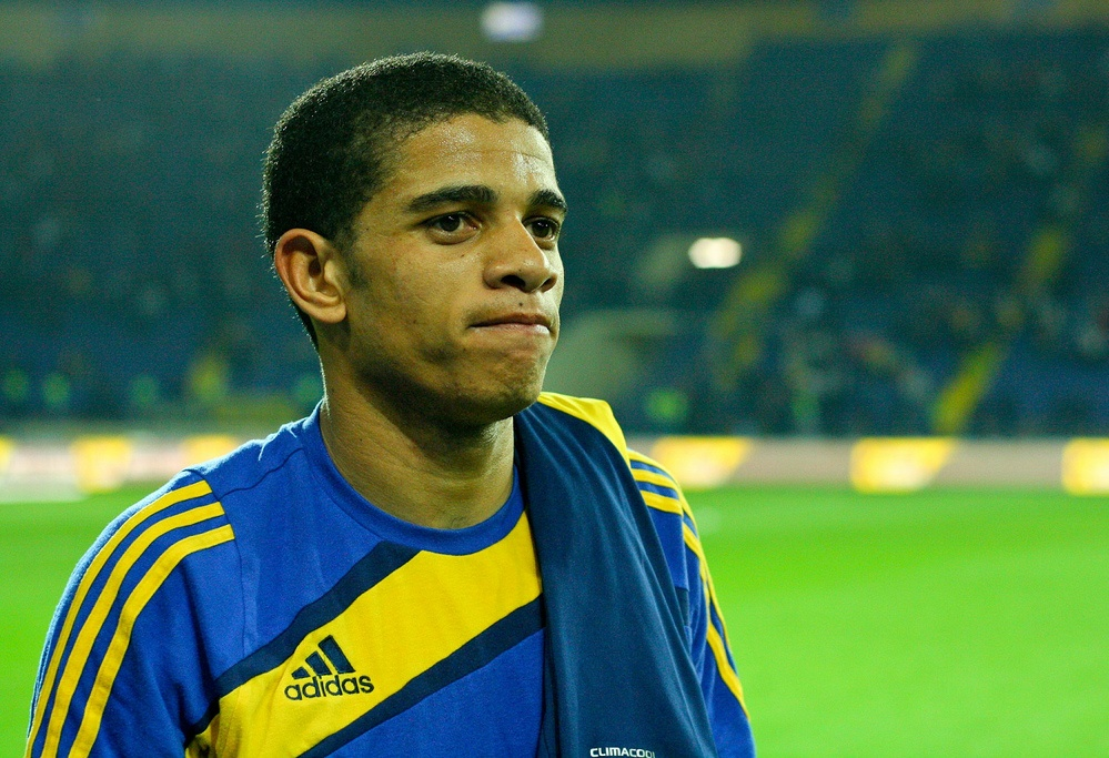 Фред Тайсон, Металлист Харьков